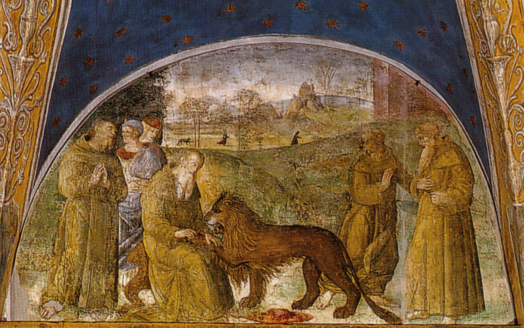 Scuola di pinturicchio, san girolamo toglie la spina dalla zampa del leone, cappella della rovere, santa maria del popolo